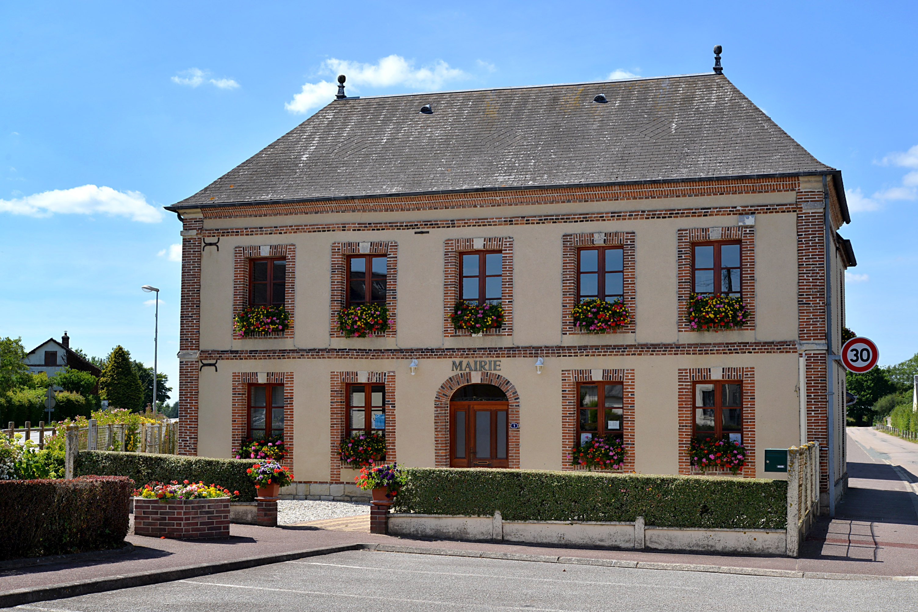 Gauville (Orne)